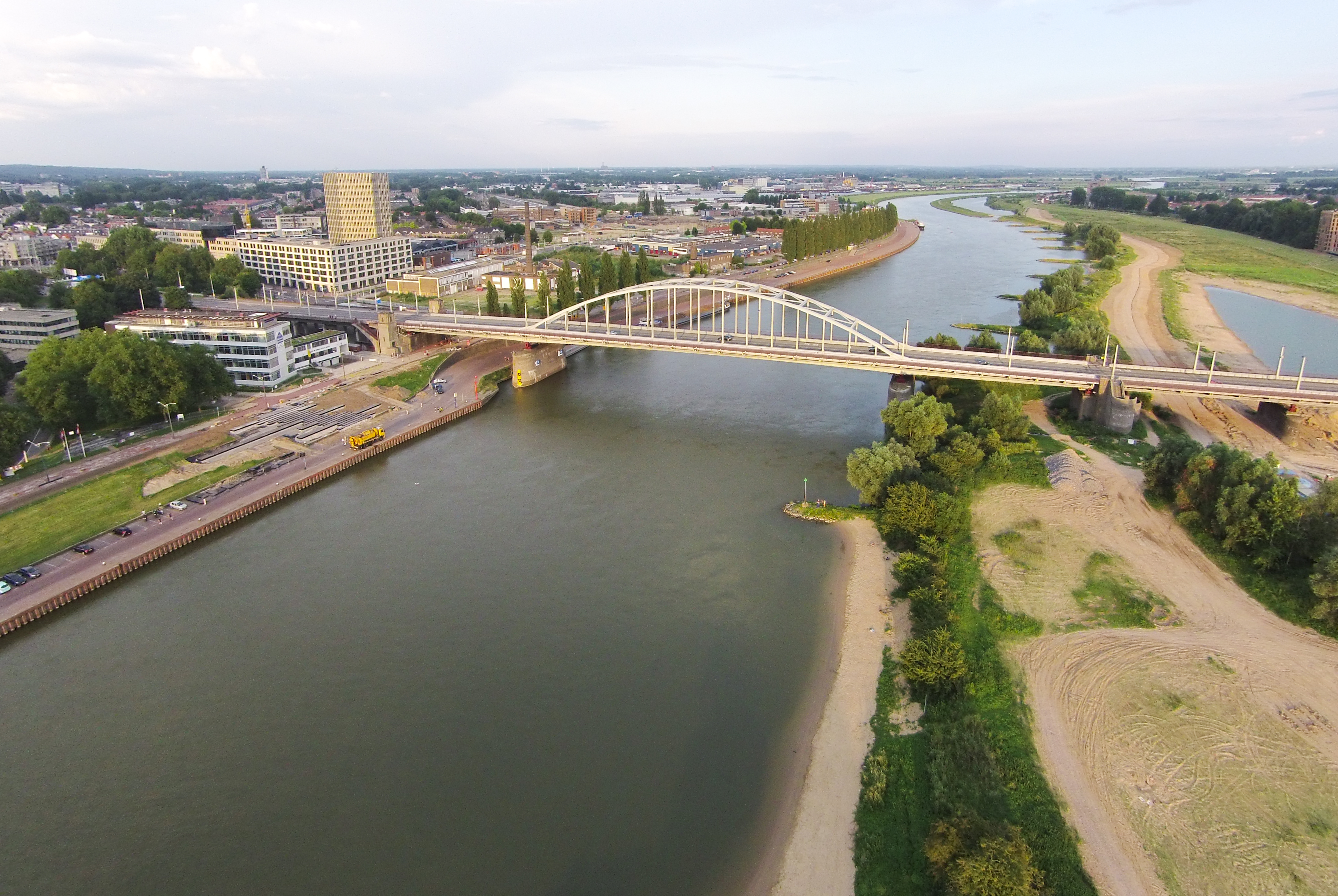 John Frostbrug aerial pic